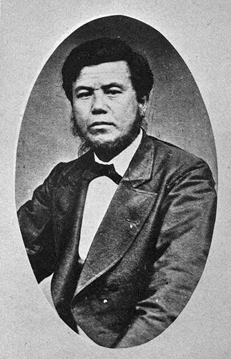 木戸孝允(Kido Takayoshi,1833-1877)